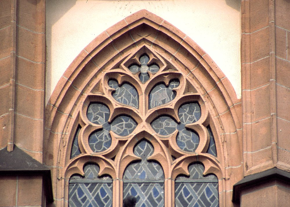 Frankfurt - Liebfrauenkirche - Masswerk